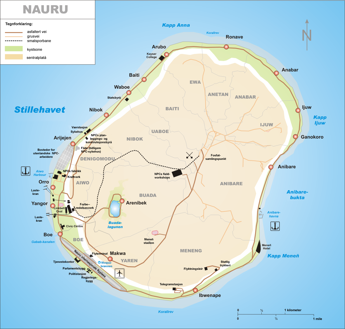 Kart over Nauru av Tschubby, tilrettelagt for norsk av Jon Harald Søby